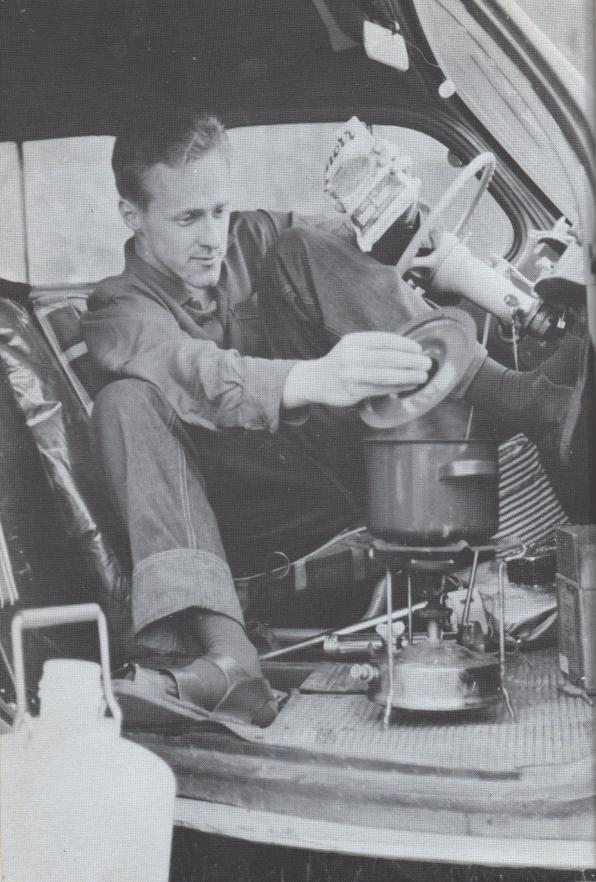 Elokuvaohjaaja-käsikirjoittaja Risto Jarva (1934-1977) ruokailutauolla jossakin Euroopassa 1950-luvun puolivälissä (lähde: Kirjan kuvaluettelo, s. 367).